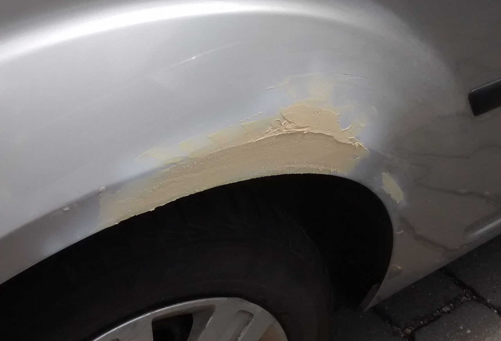 Spachtelmasse Autospachtel